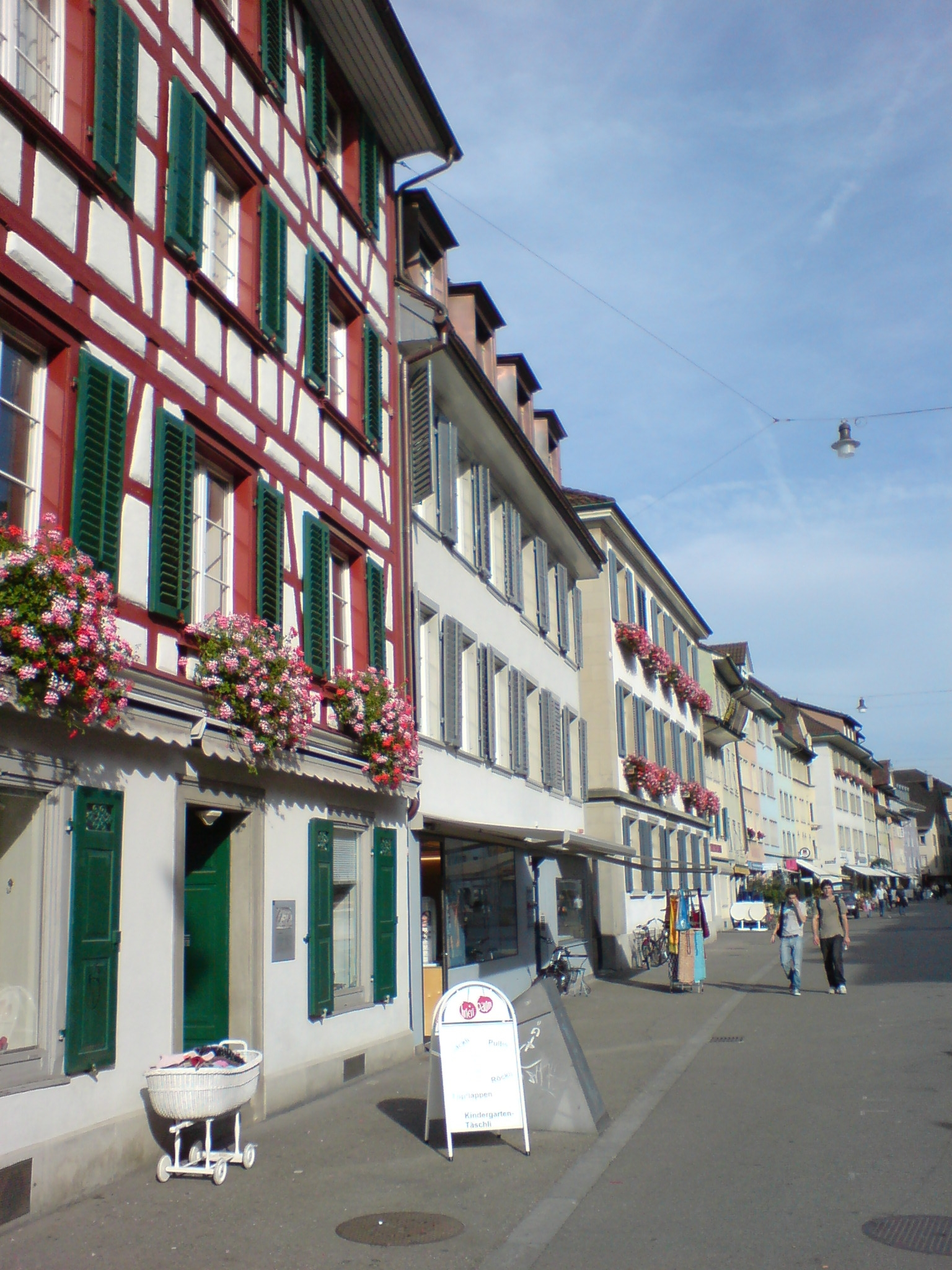 Steinbergasse, Winterthur, Switzerland